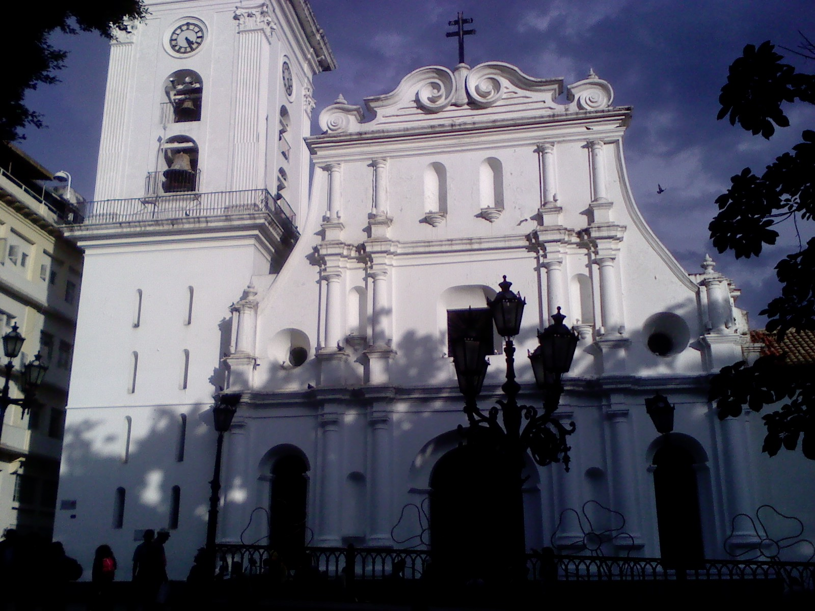 Iglesia en Caracas